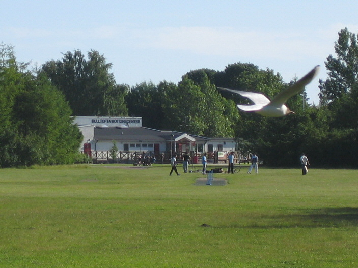 Motionscentret i Bulltoftaparken i Malmö. Bilden tagen av mig själv 28 juni 2005.